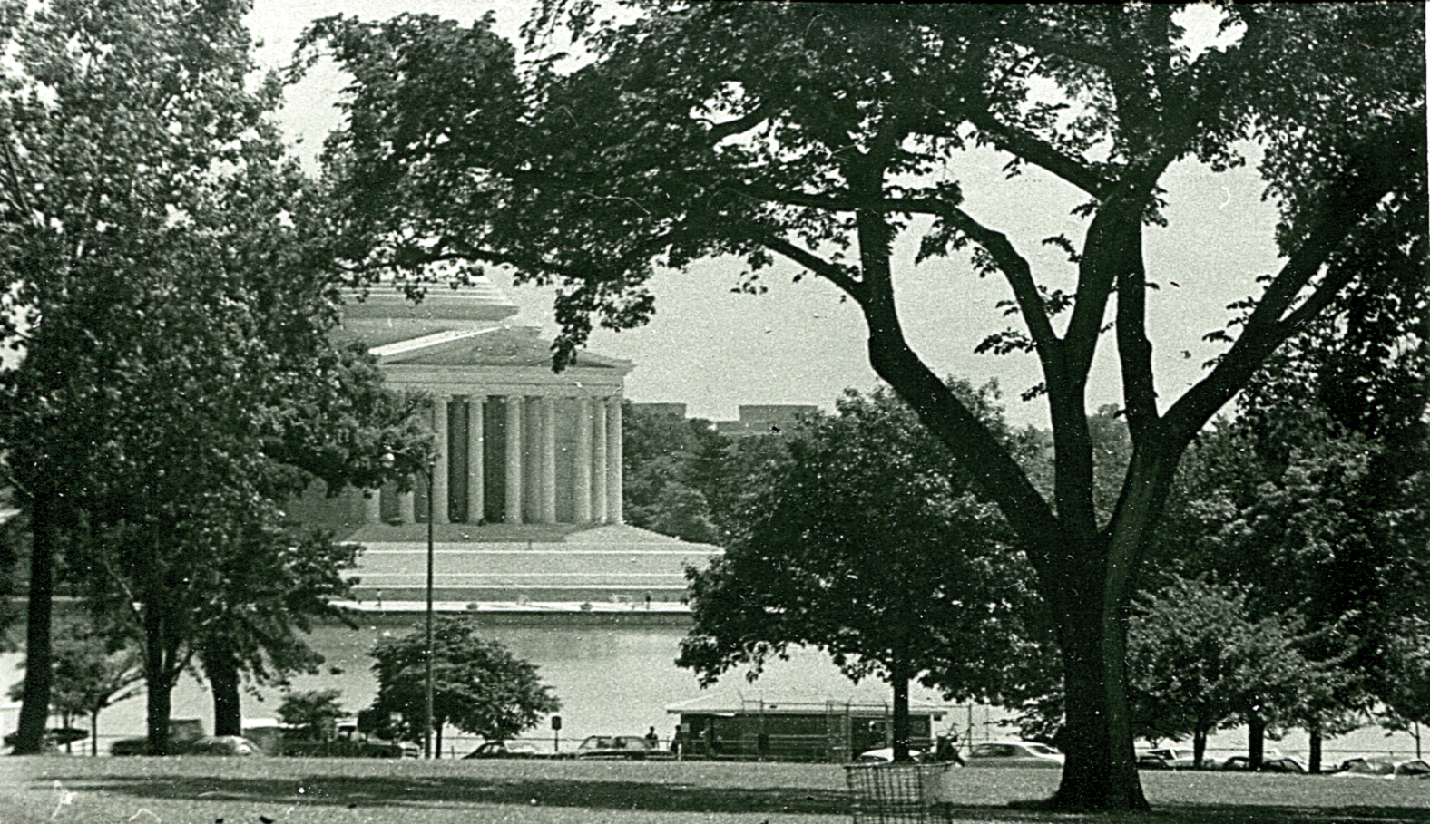 Мемориал Джефферсона в Вашингтоне